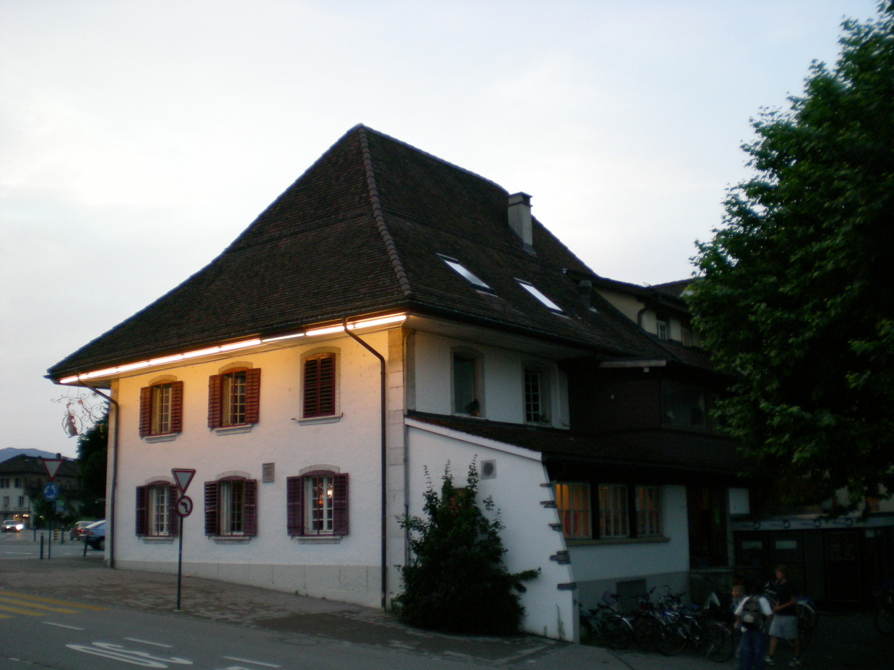 St. Urs Biberist kurz vor dem Brand